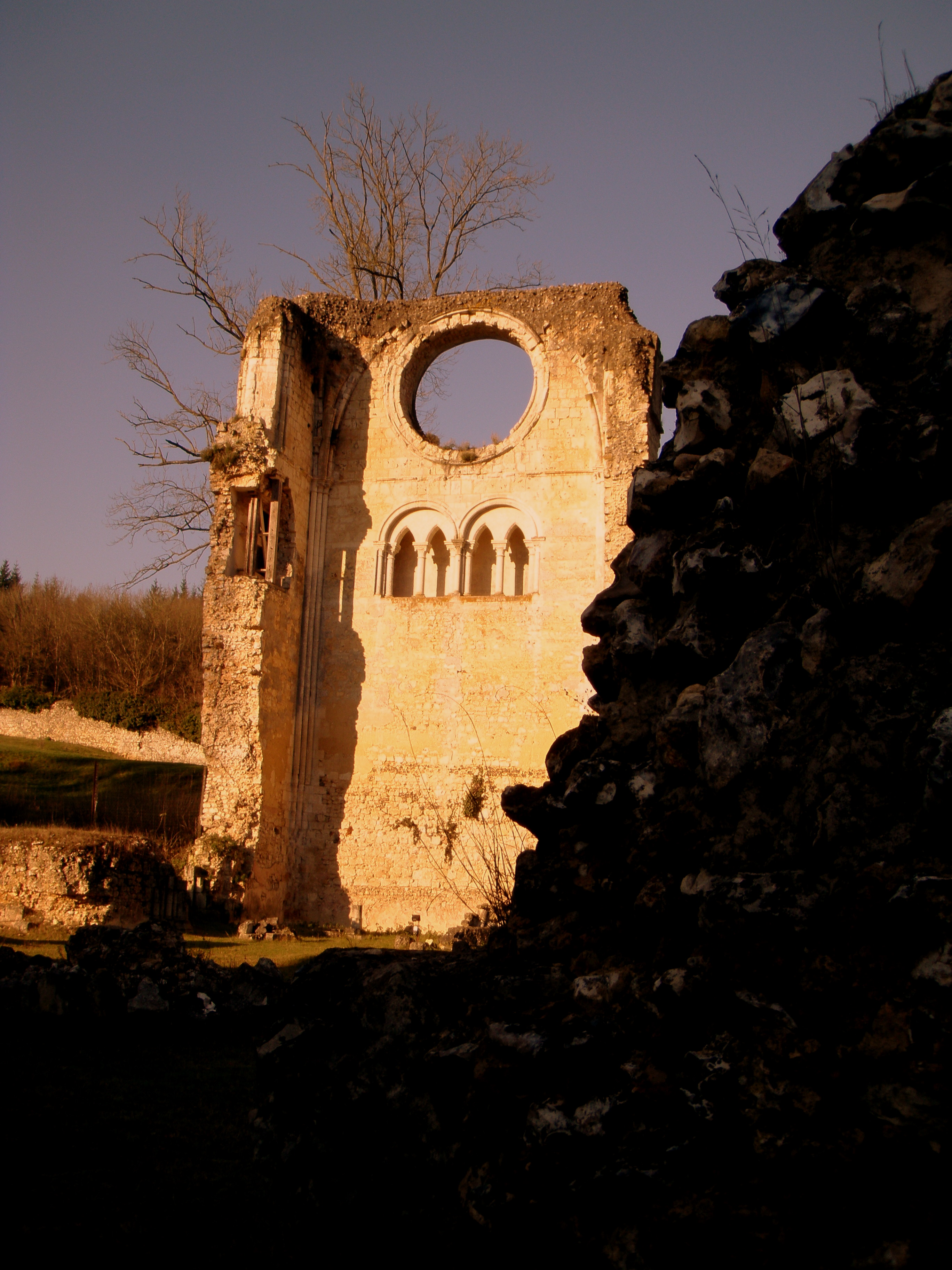 La nef de l'abbaye de Mortemer (Normandie)